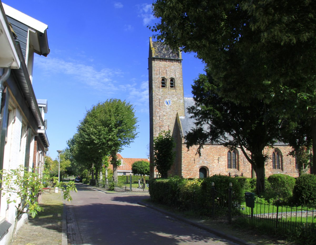 Het mooie terpdorp Dearsum met de Hervormde Sint Pieterkerk uit omstreeks 1200. Dearsum ligt in de Gemeente Boarnsterhim in Friesland.